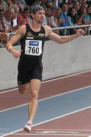 Jonas Plass beim DLV WM-Testwettkampf 2011 im Stadion der MTG Mannheim.